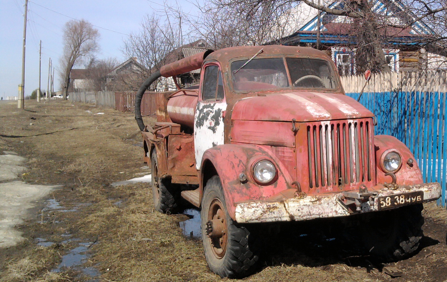 ГАЗ-51 в Чутеево в Чувашии